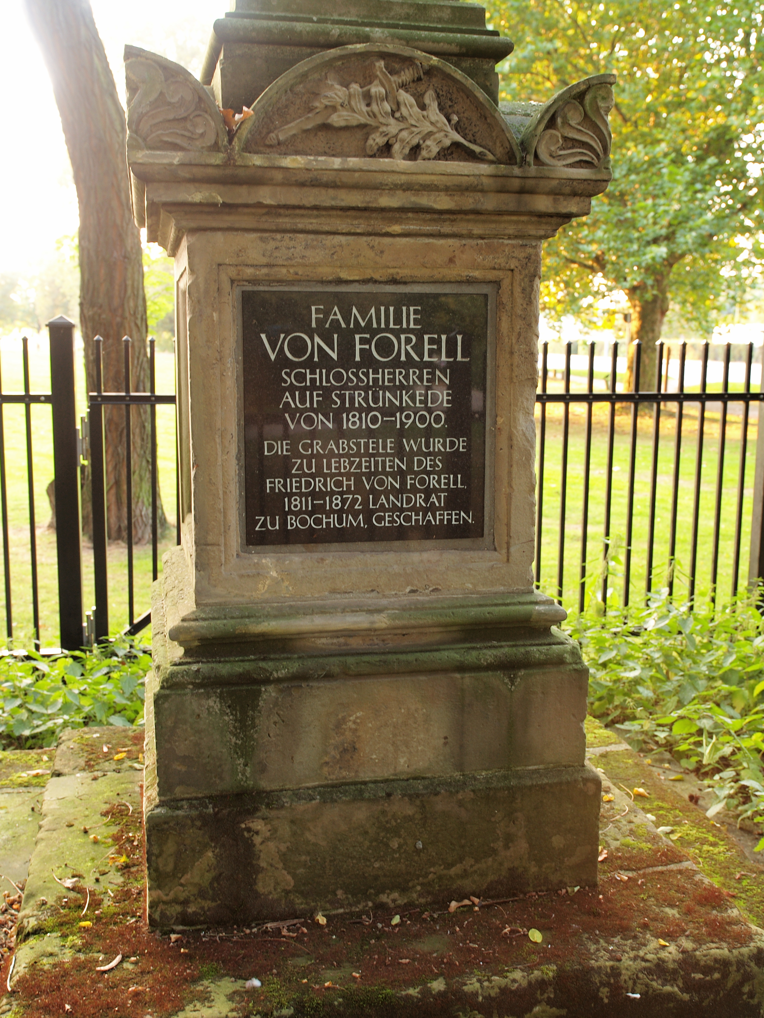 Grabdenkmal mit Gedenkplatte der Familie von Forell, ehemals Besitzer des Schlosses Strünkede in Herne